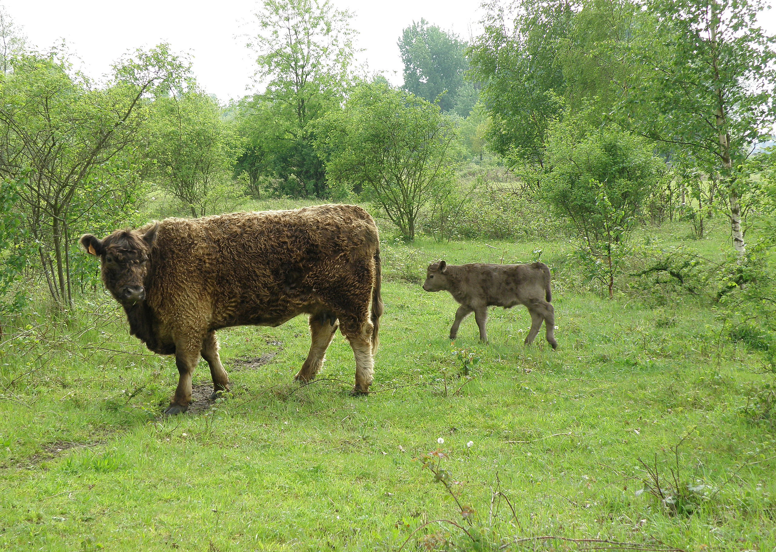 Antwerpen, België. District Hoboken. Natuurgebied Hobokense Polder. Galloway-runderen.